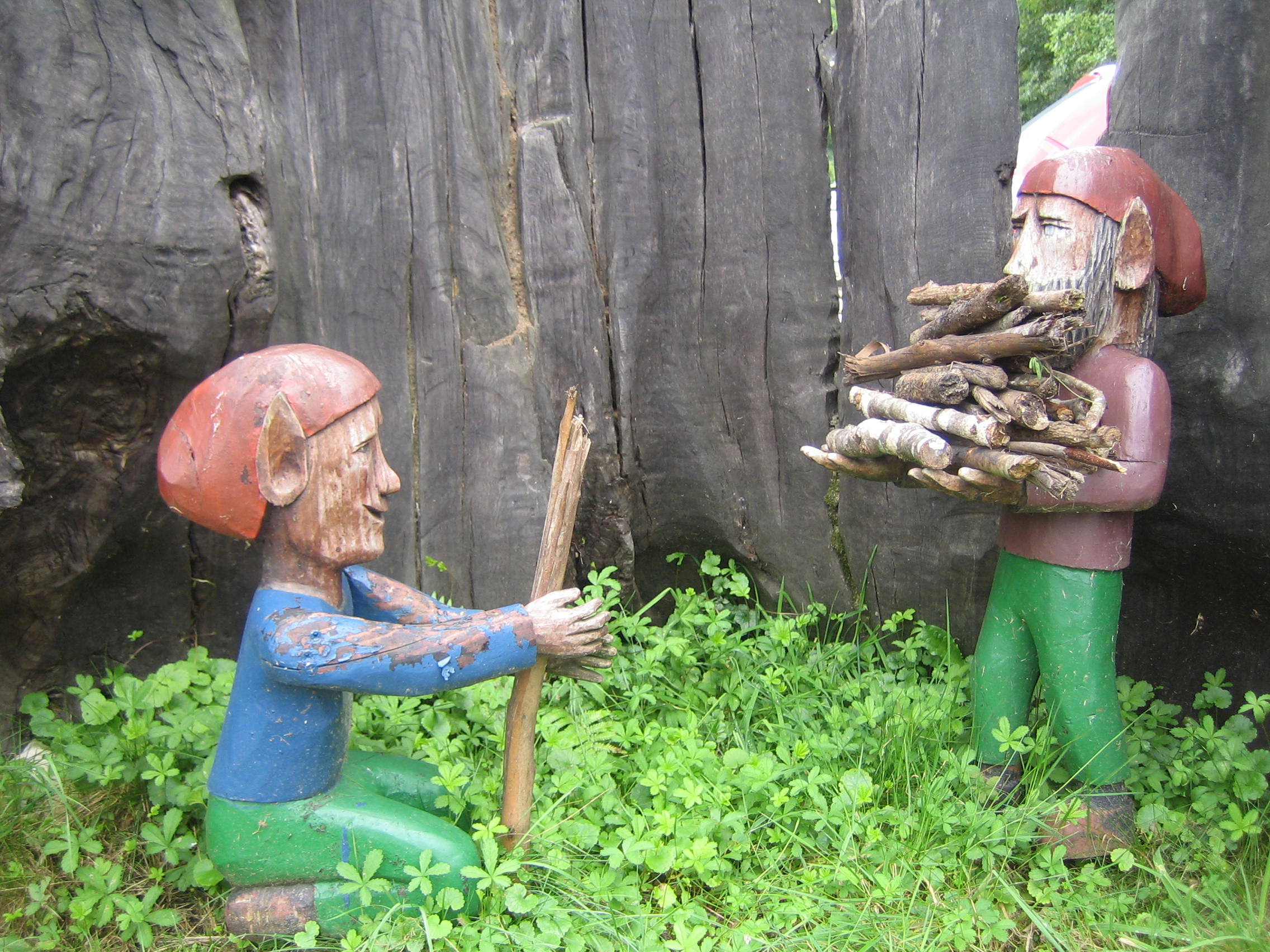 Trasgos del camín encantau del valle de Ardisana